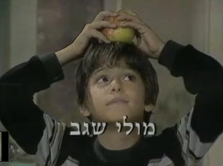 מולי שגב הוא מפיק ותסריטאי ישראלי. כילד התוכנית "קרובים קרובים" בטלוויזיה הלימודית